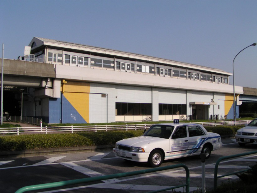 2005年4月17日に投稿者が南口駅で撮影。